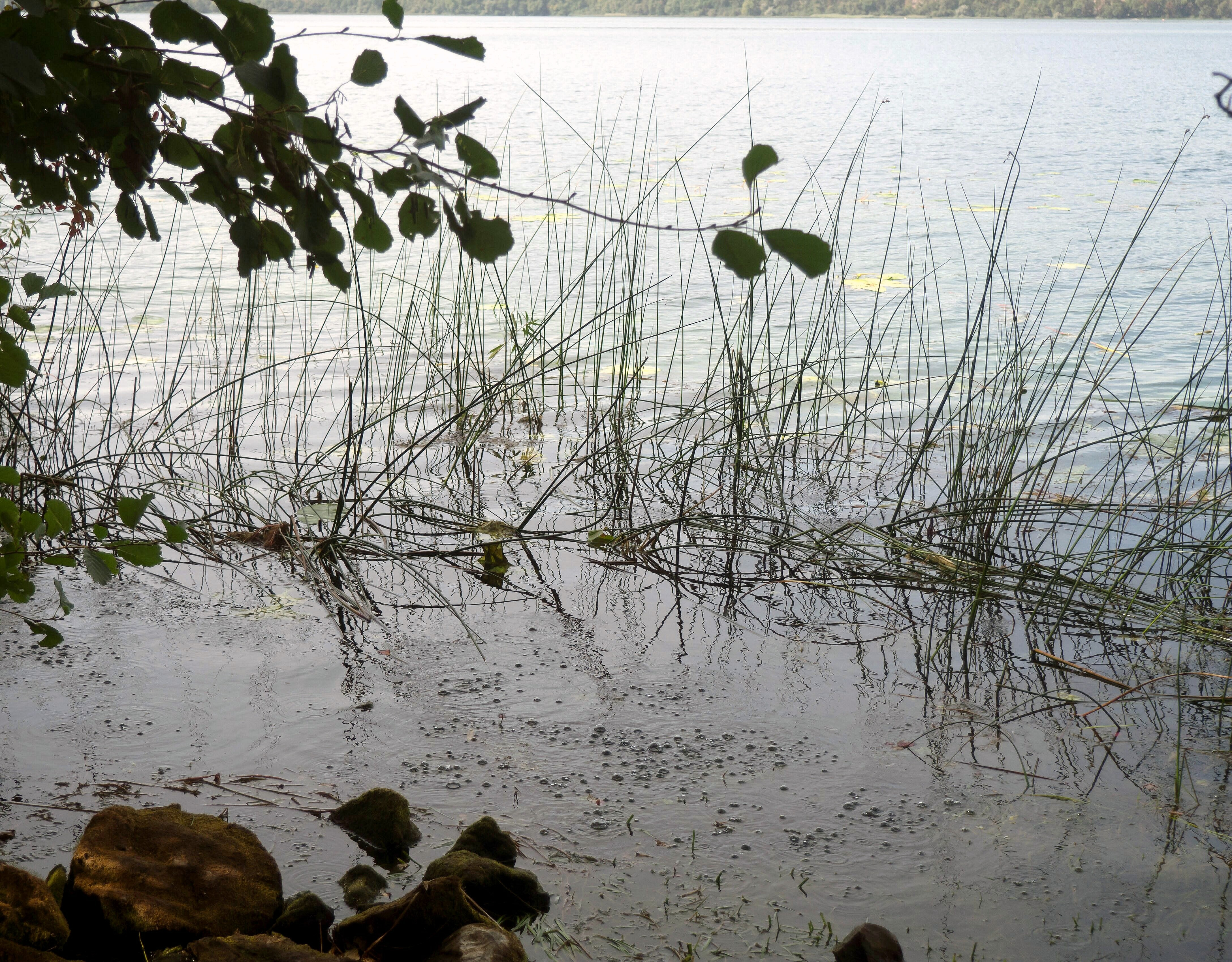 Am Ostufer des Laacher Sees tritt an mehreren Stellen Kohlendioxid aus, das aus tiefen Magmakammern stammt. Mittendrin gedeiht besonders gut die Sumpf-Segge.